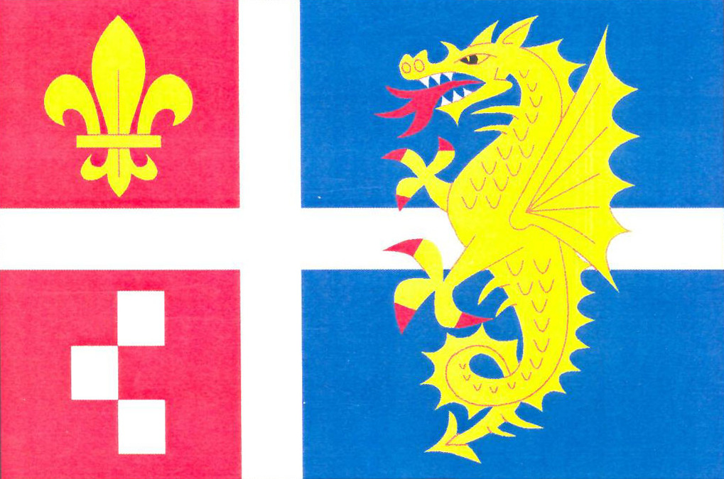 Erpužice - znak Contents 1 Licensing 2 Zdroj 3 Licensing 4 Original upload log Licensing Zdroj Registr komunálních symbolů